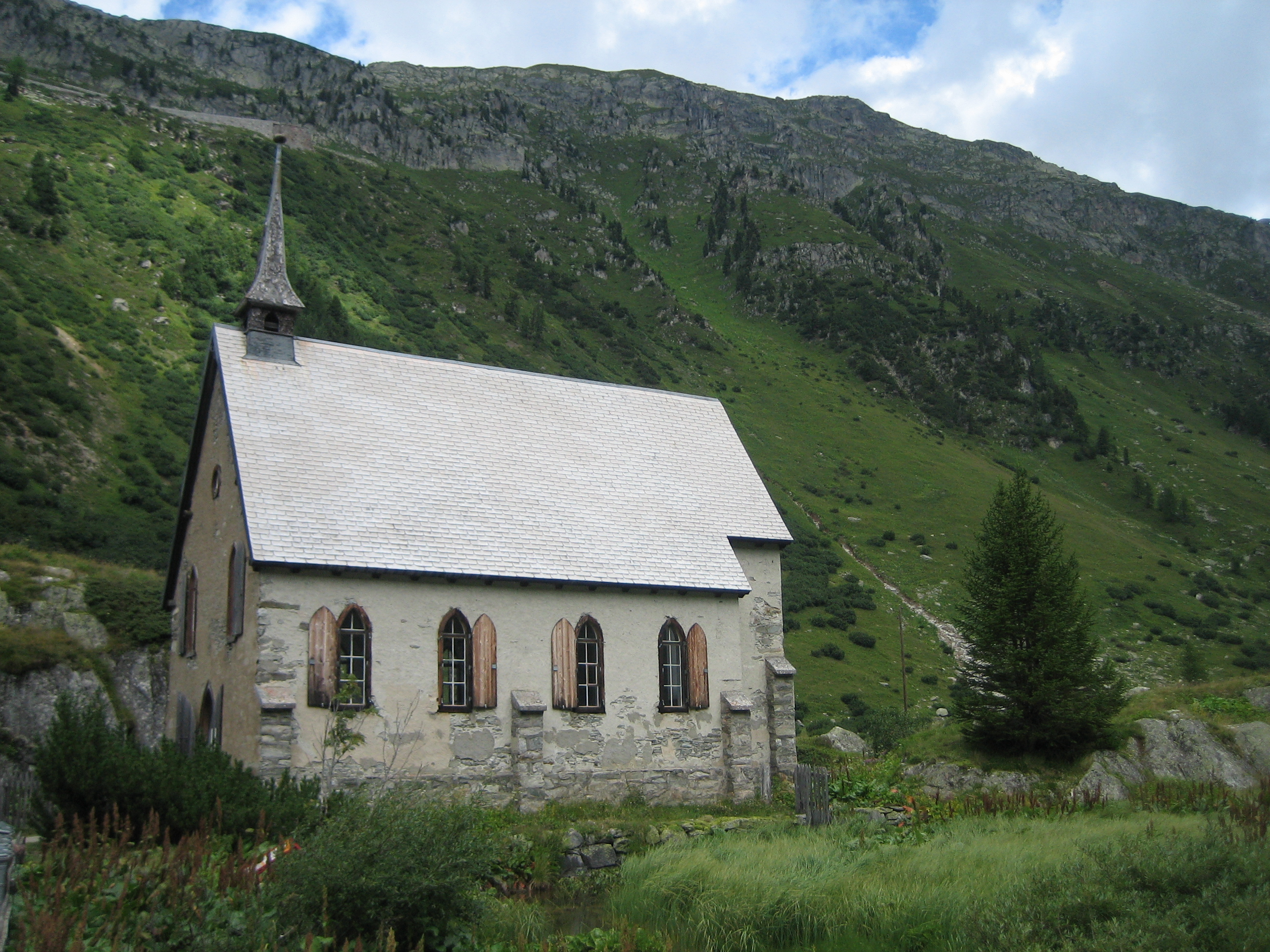 Anglikanische Kapelle in Gletsch, Wallis, Schweiz